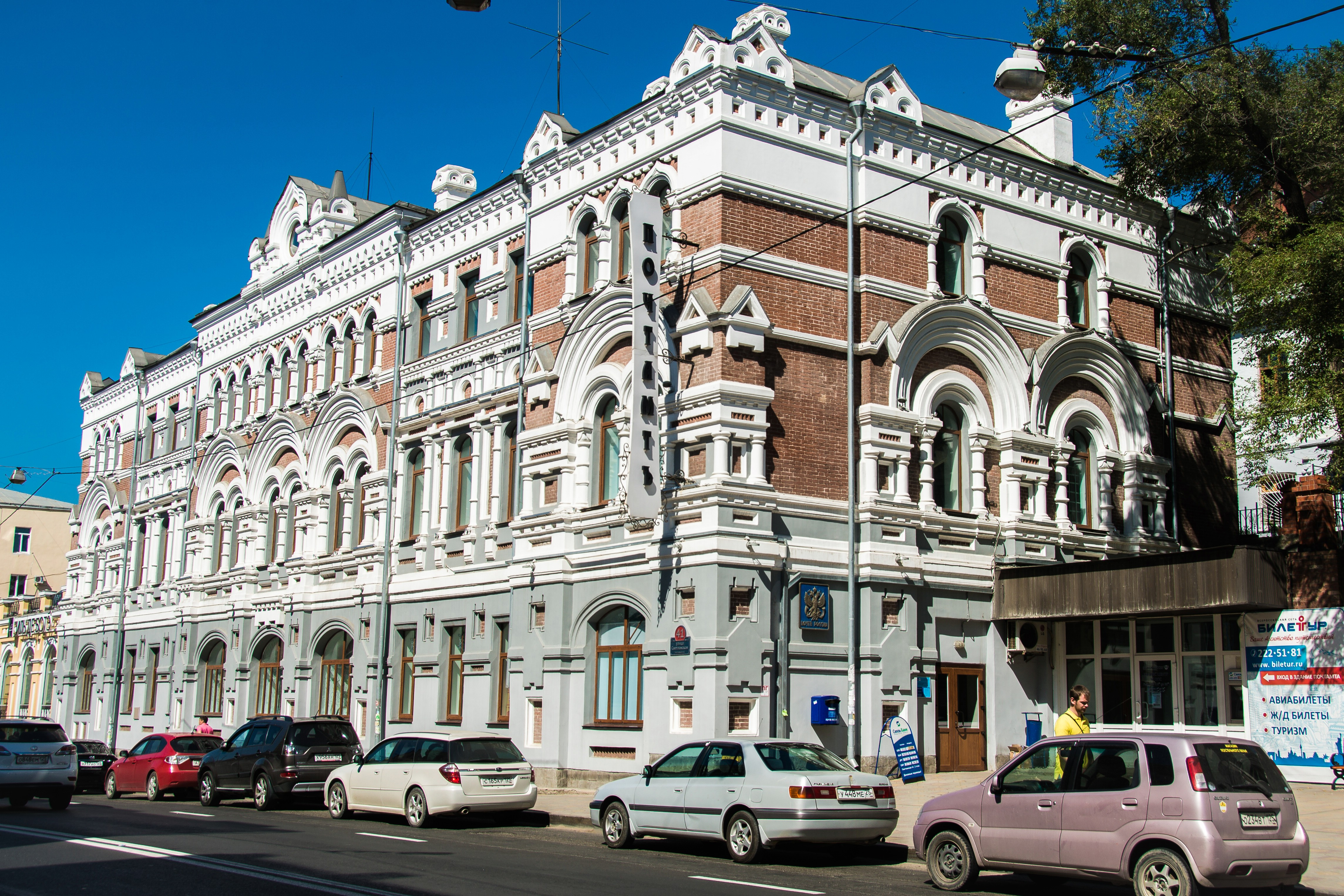 Контора почтово-телеграфная (Приморский край, Владивосток, Светланская улица, 41)